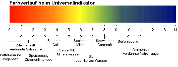 pH-Skala mit Farben des Universalindikators und Beispiele für verschiedene pH-Werte